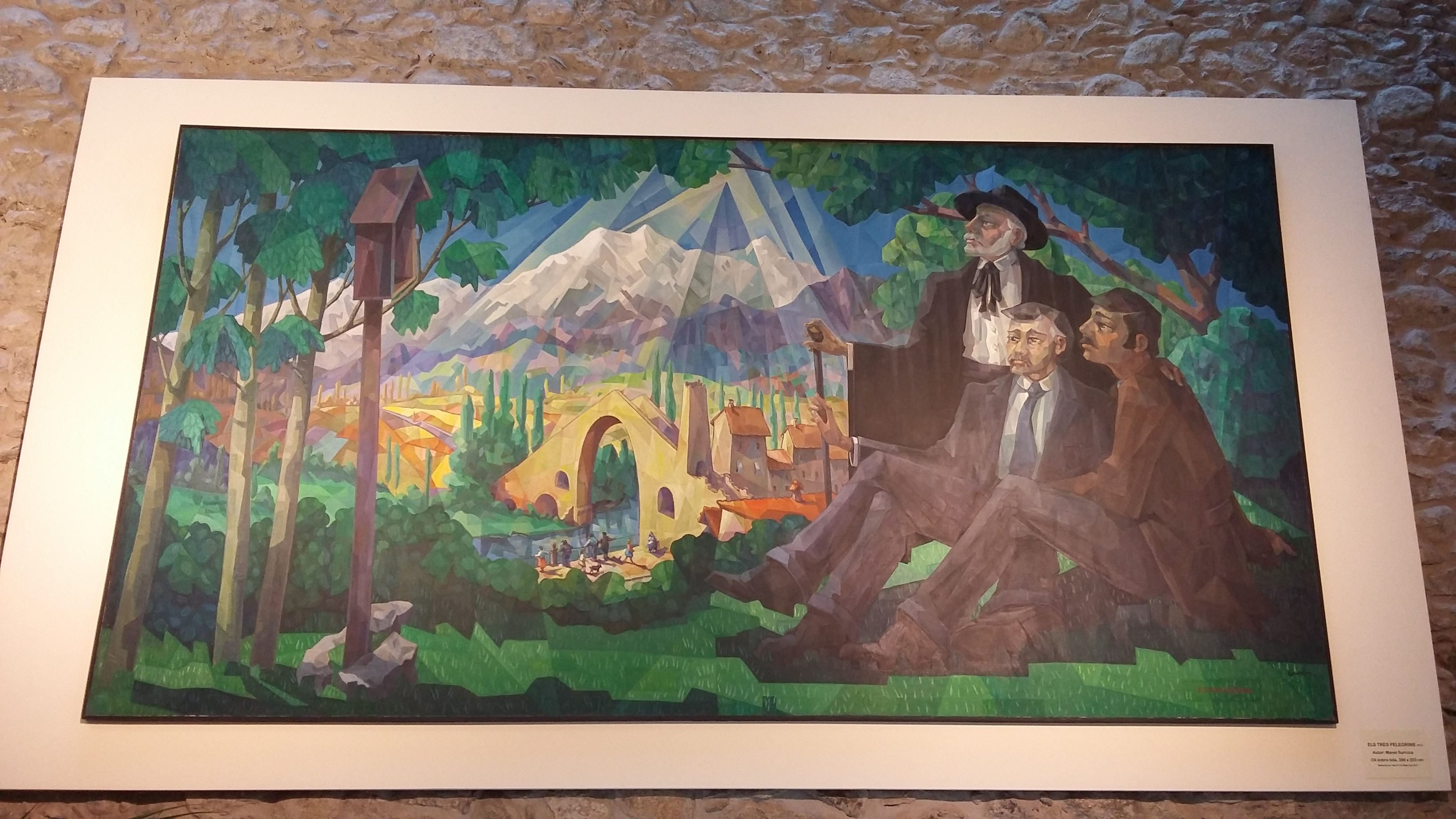 Obra Els tres pelegrins situada a l'ajuntament de Camprodon